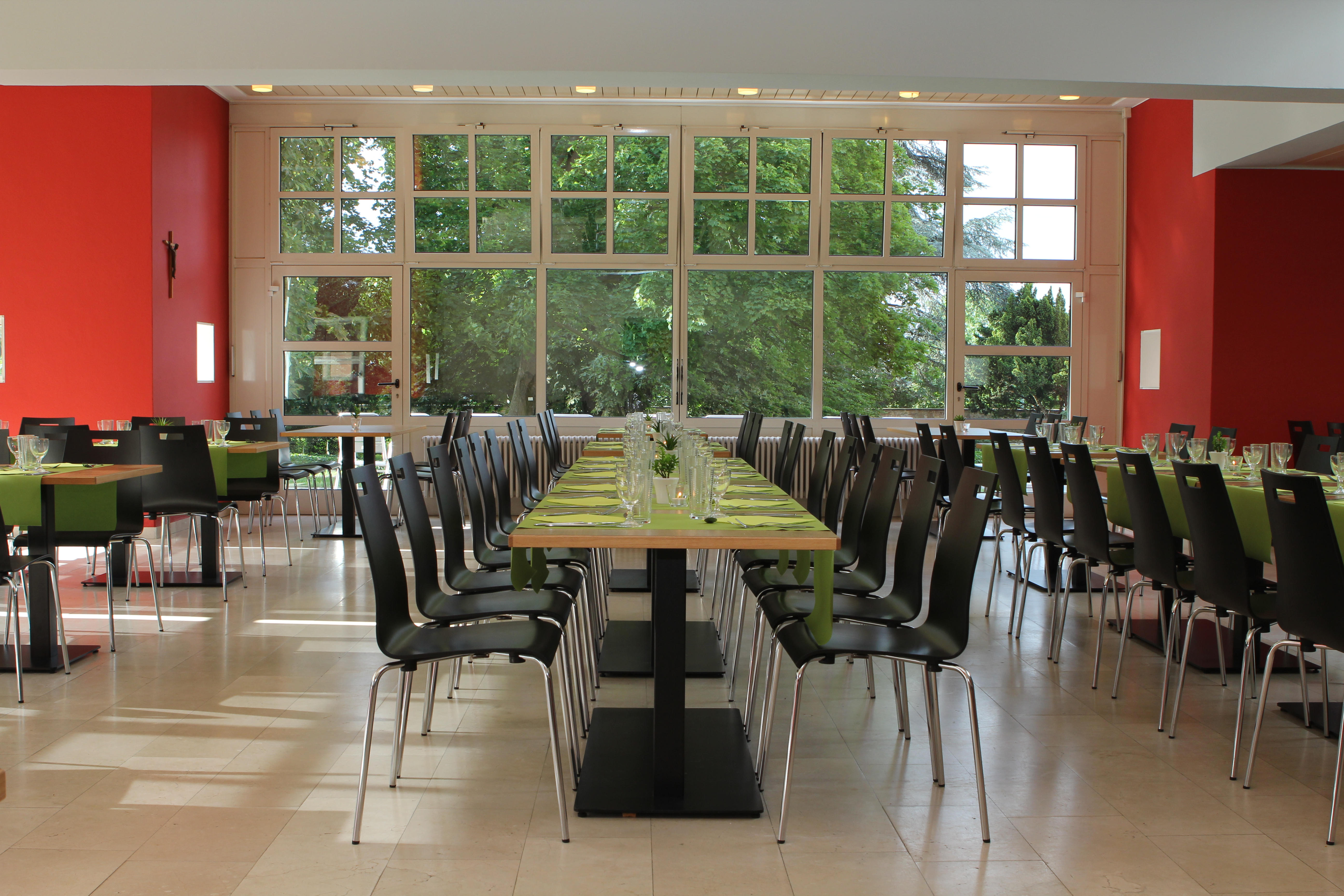 Mensa im Park der Philosophisch-Theologischen Hochschule Sankt Georgen Frankfurt am Main